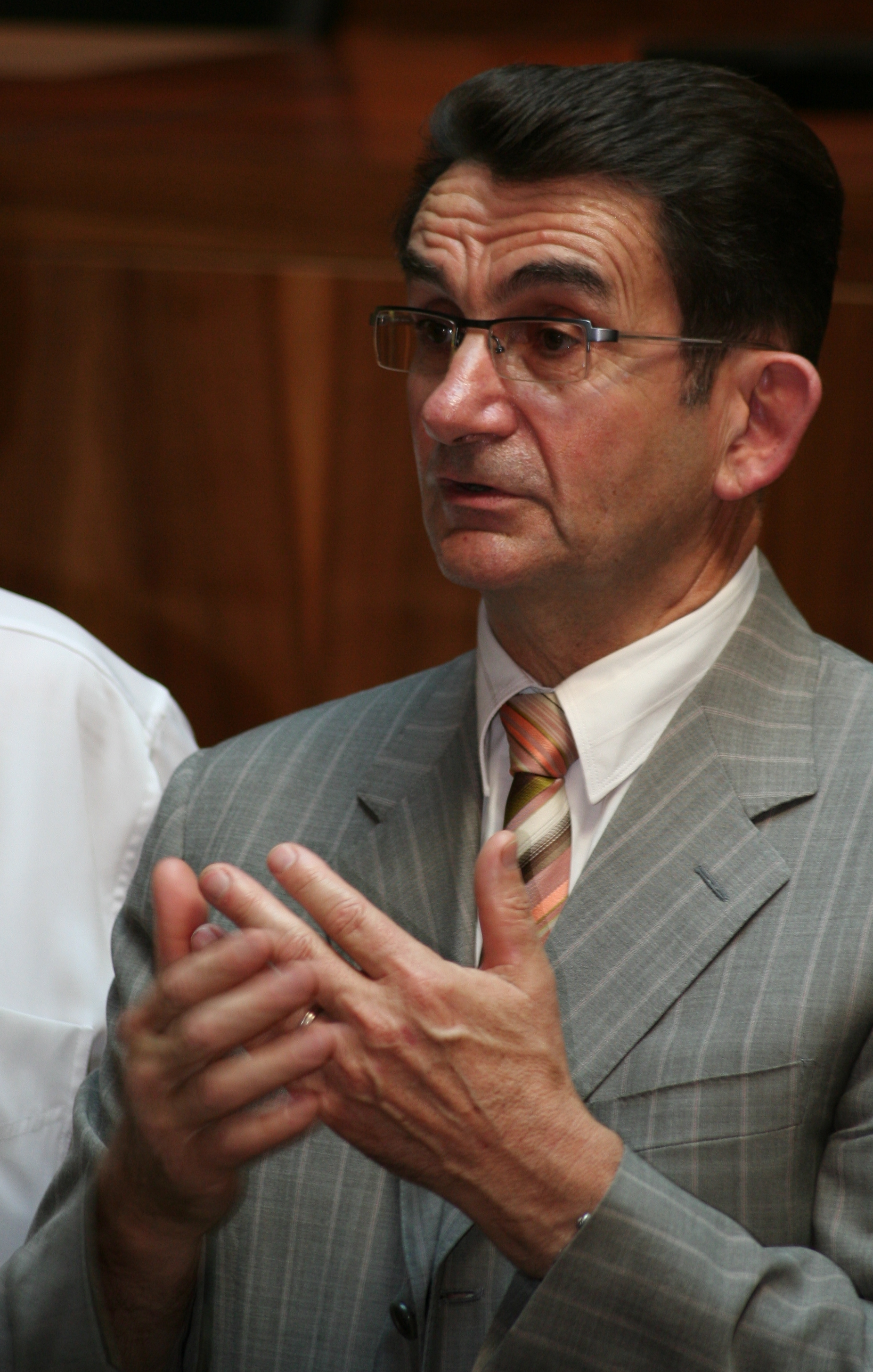 Gérard Miquel en 2008.